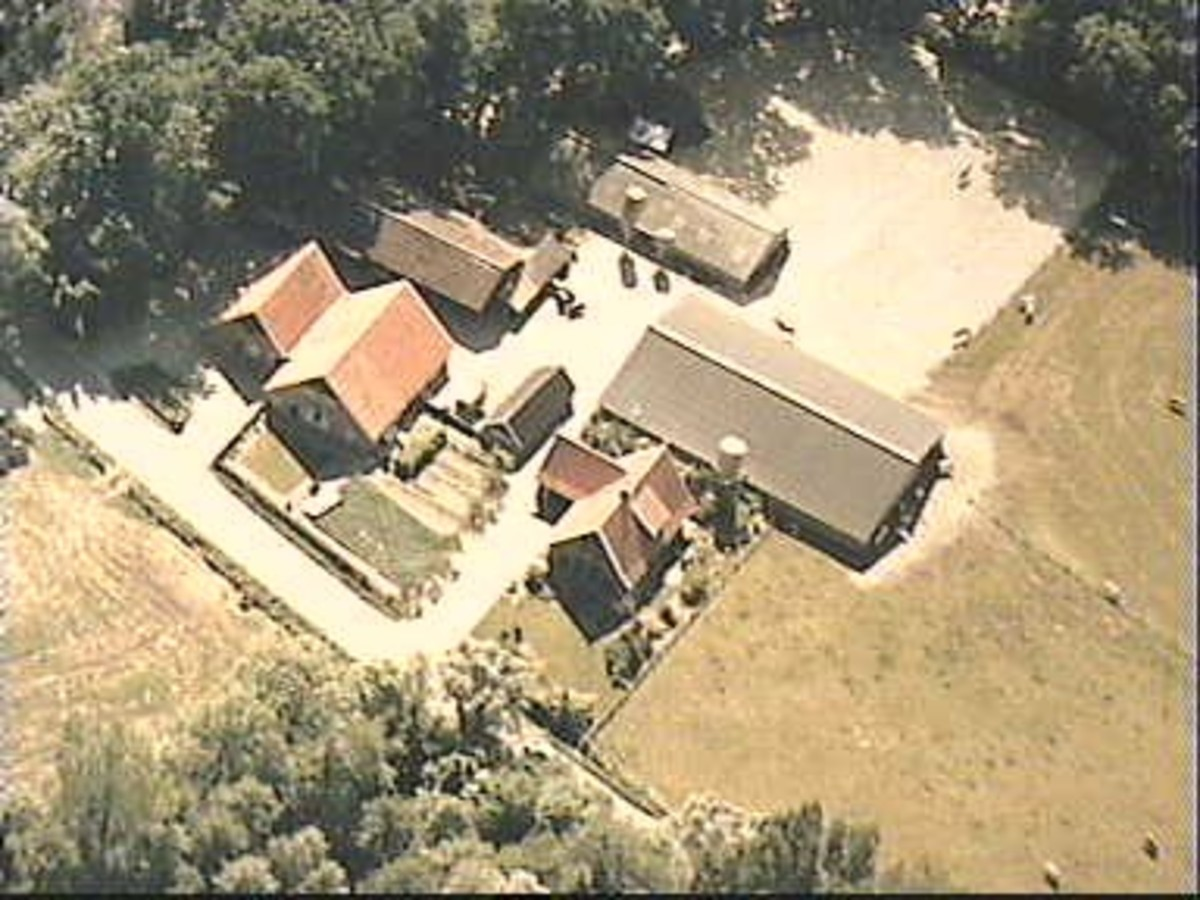 Zandgebied/ Boerderijen: voor- en zijgevel nr. X 85-11-3 (opmerking: Deze afbeelding hebben wij helaas alleen in deze lage resolutie.)